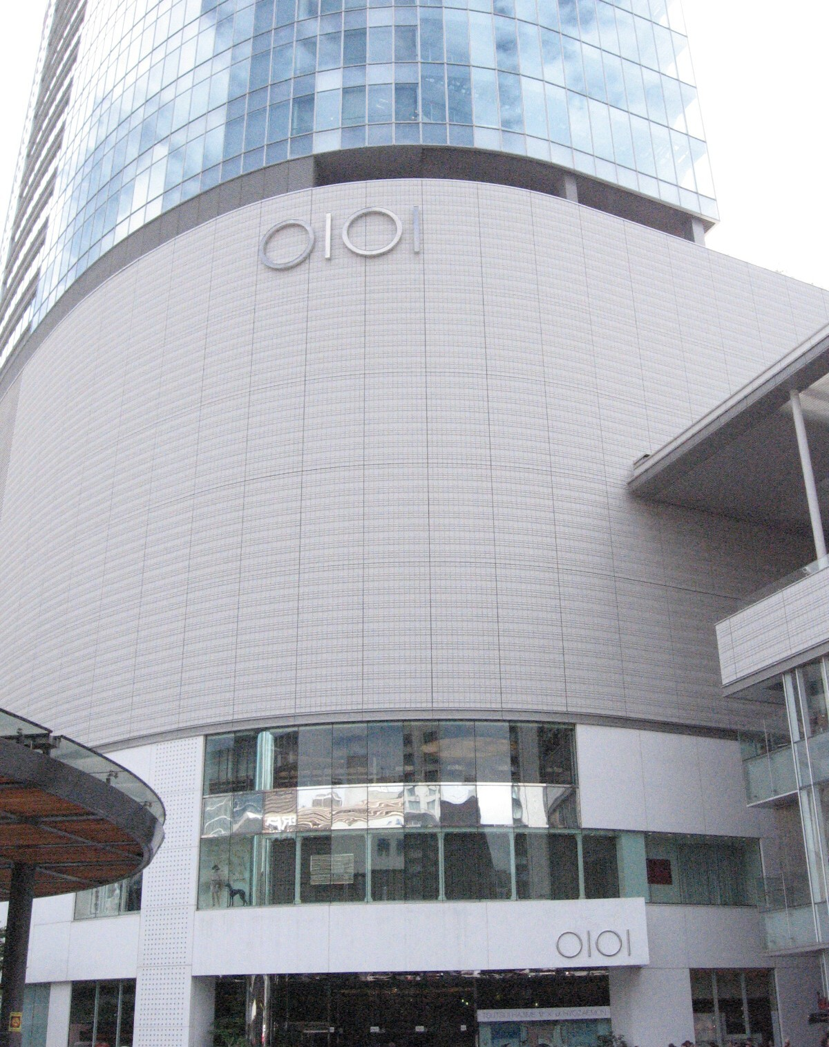 Yurakucho Marui. Chiyoda-ku, Tokyo.